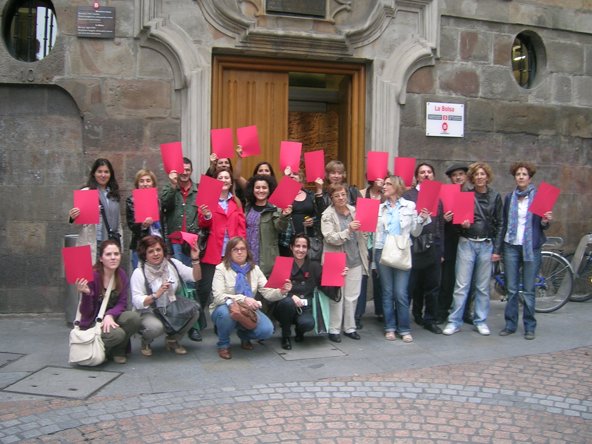 XVII Encontro de Centros de Documentación e Bibliotecas de Mulleres (Bilbao, 2010) (2)